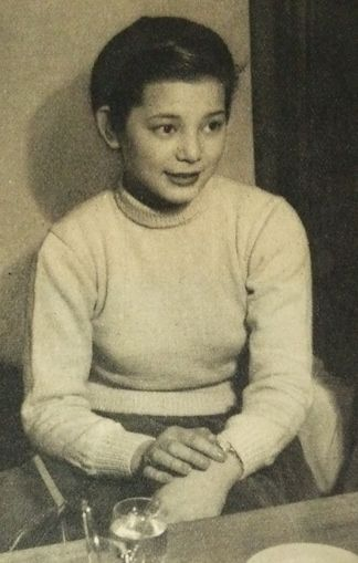 安西郷子